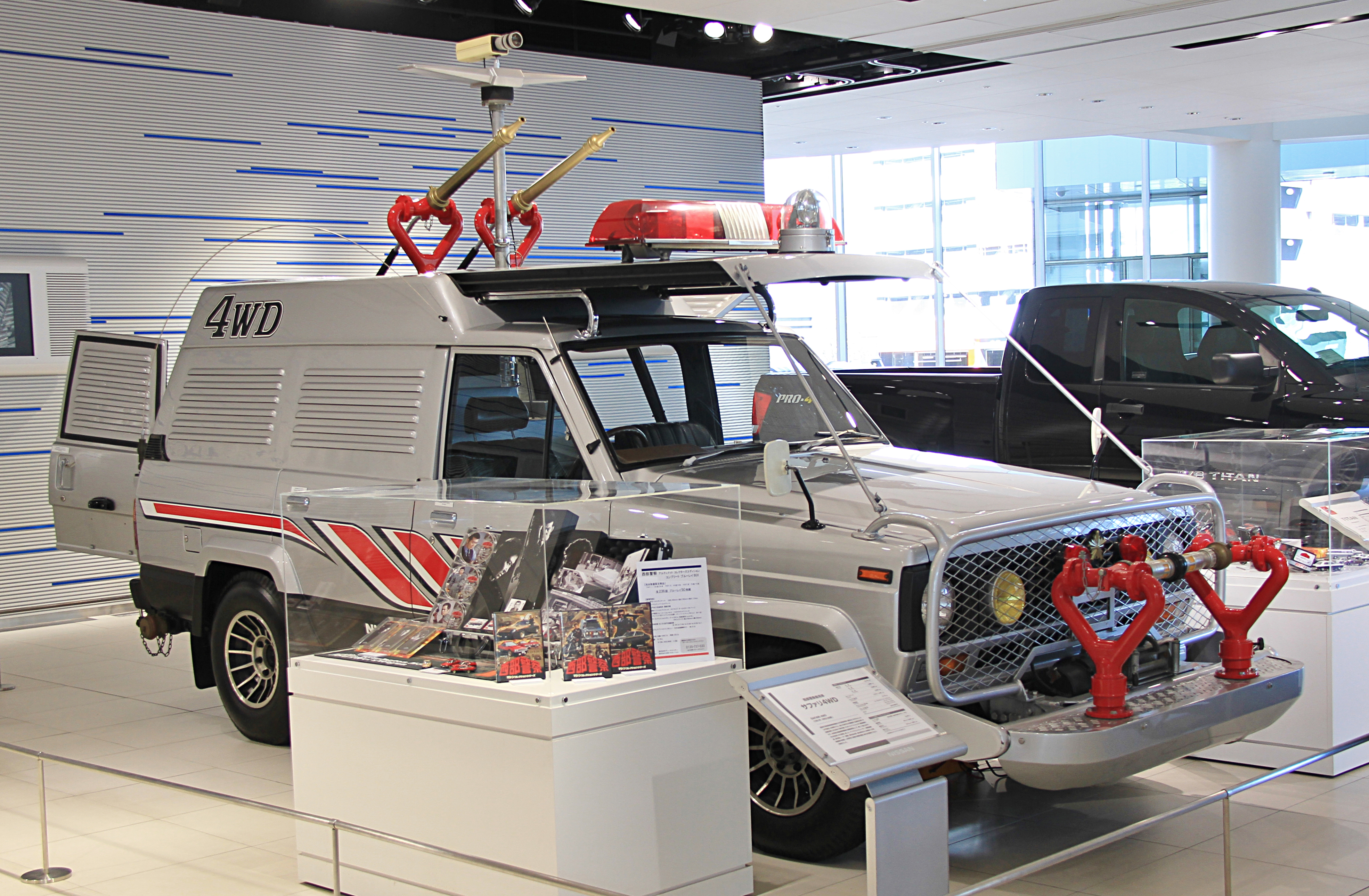 Nissan Safari 2014年3月 日産横浜グローバル本社